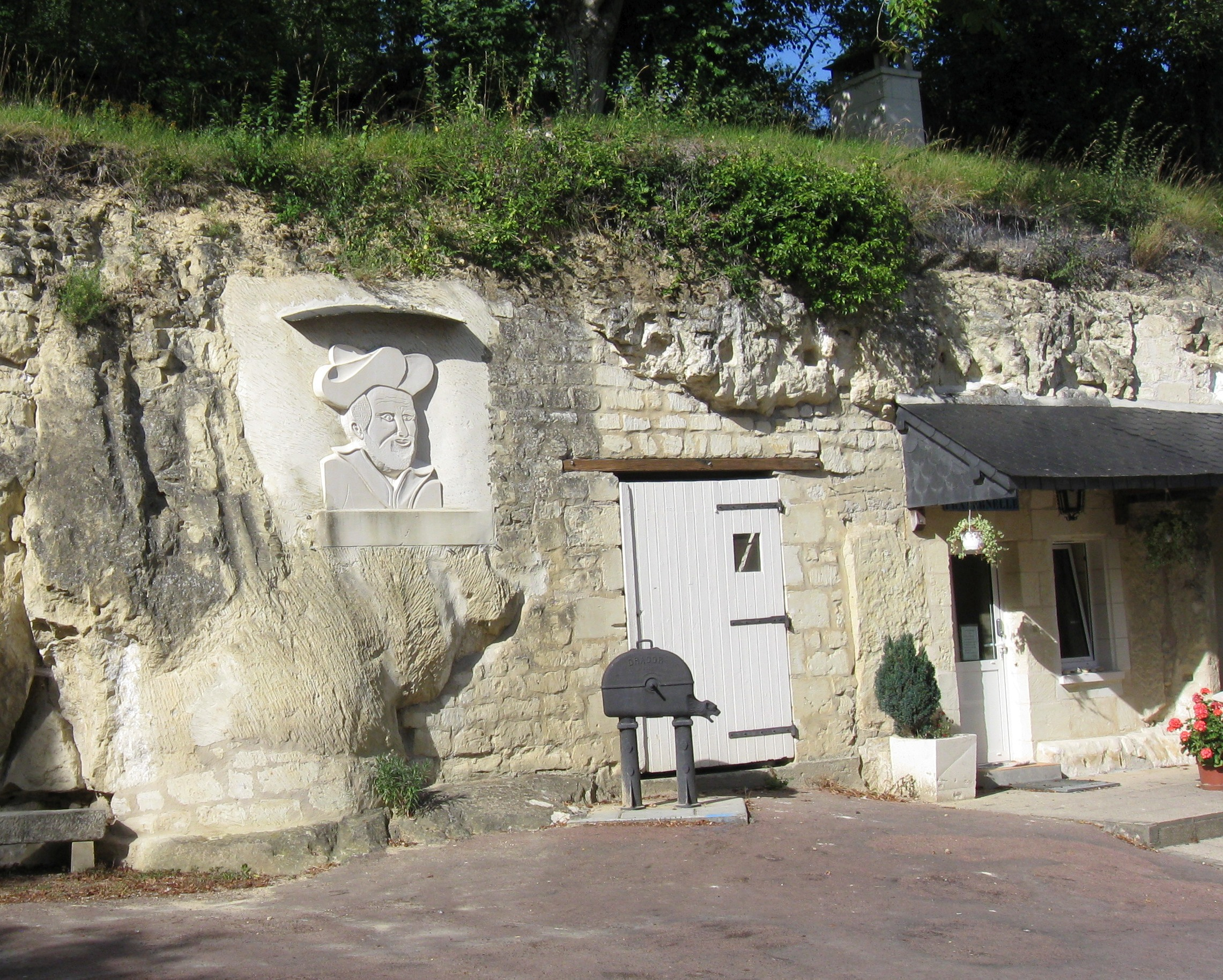 Portrait de Rabelais sculpté dans le tuffeau, habitation troglodytique à La Roche-Clermault. (Indre-et-Loire, région Centre-Val de Loire).